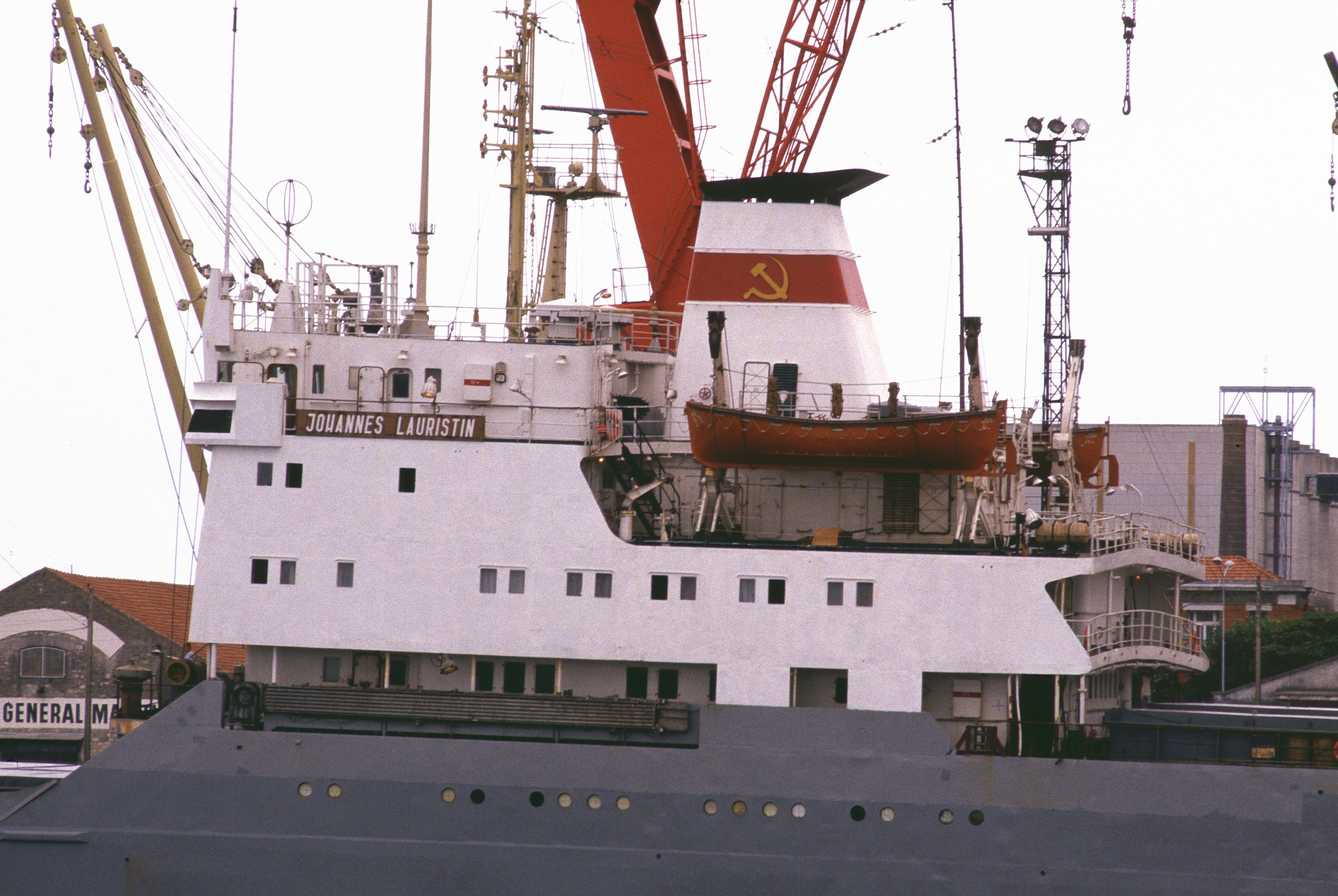 Le château d'un navire cargo vu de profil. Port de commerce de La Rochelle-Pallice. La Rochelle, France. Name: IOKHANNES LAURISTIN IMO number: 7362641